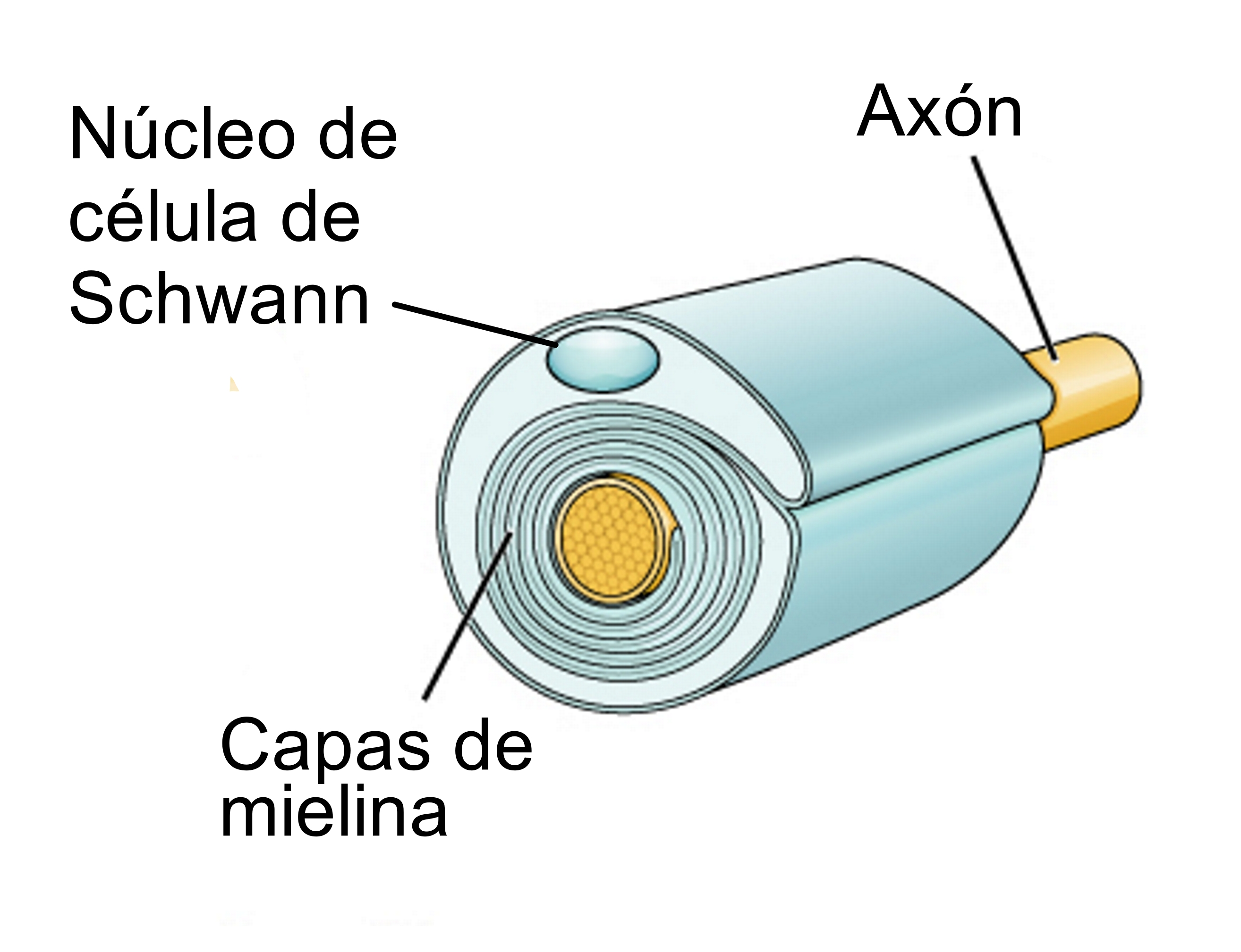 Esquema en el que se representa el axón de una neurona rodeado por la vaina de mielina de una célula de Schwann.